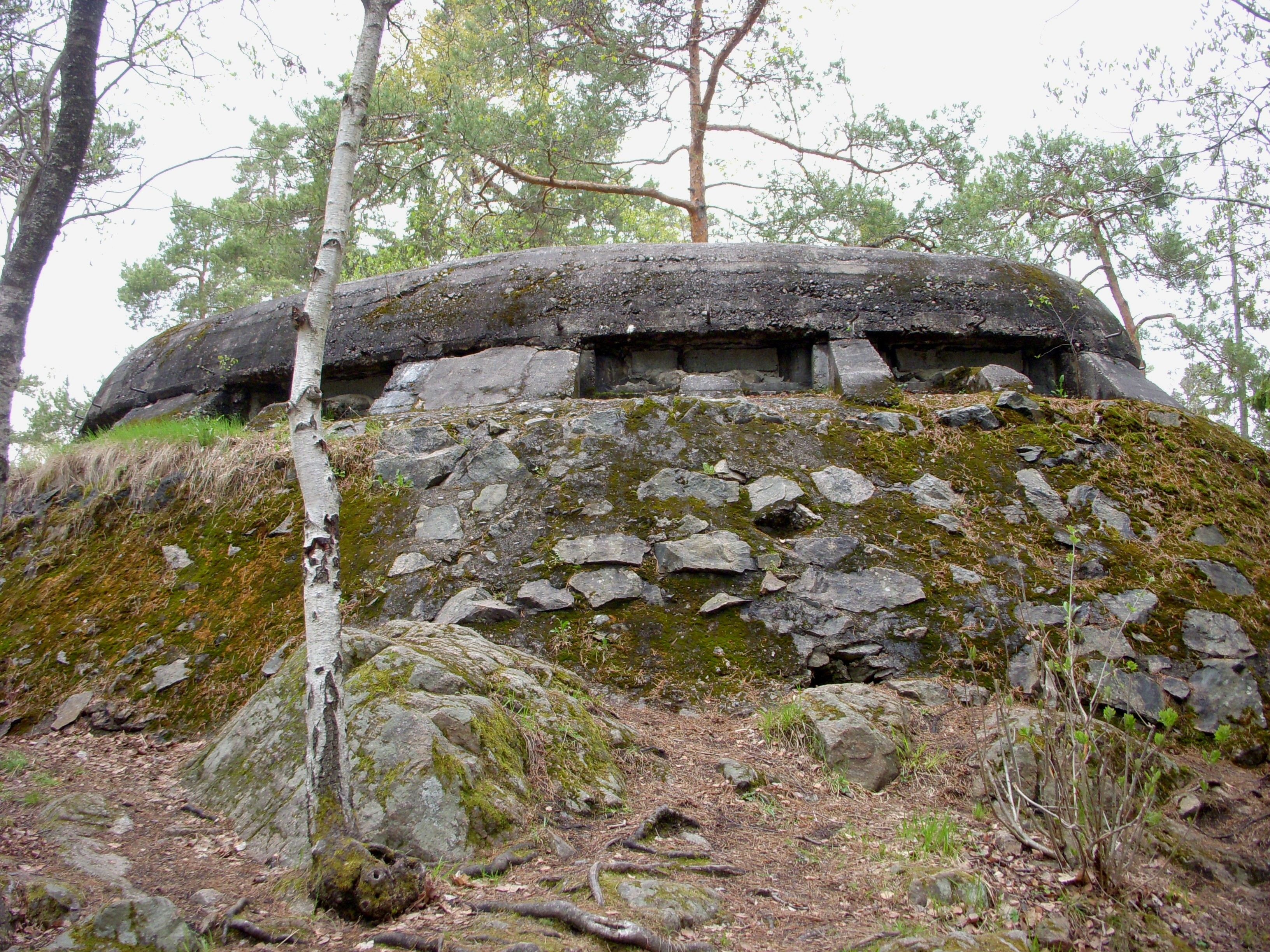 Lännafortet i Tyresö från första världskriget i maj 2011.